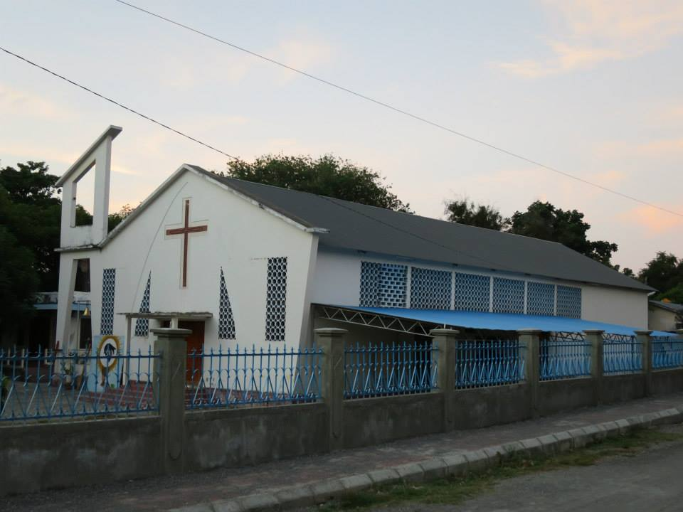 Vila de Liquiçá